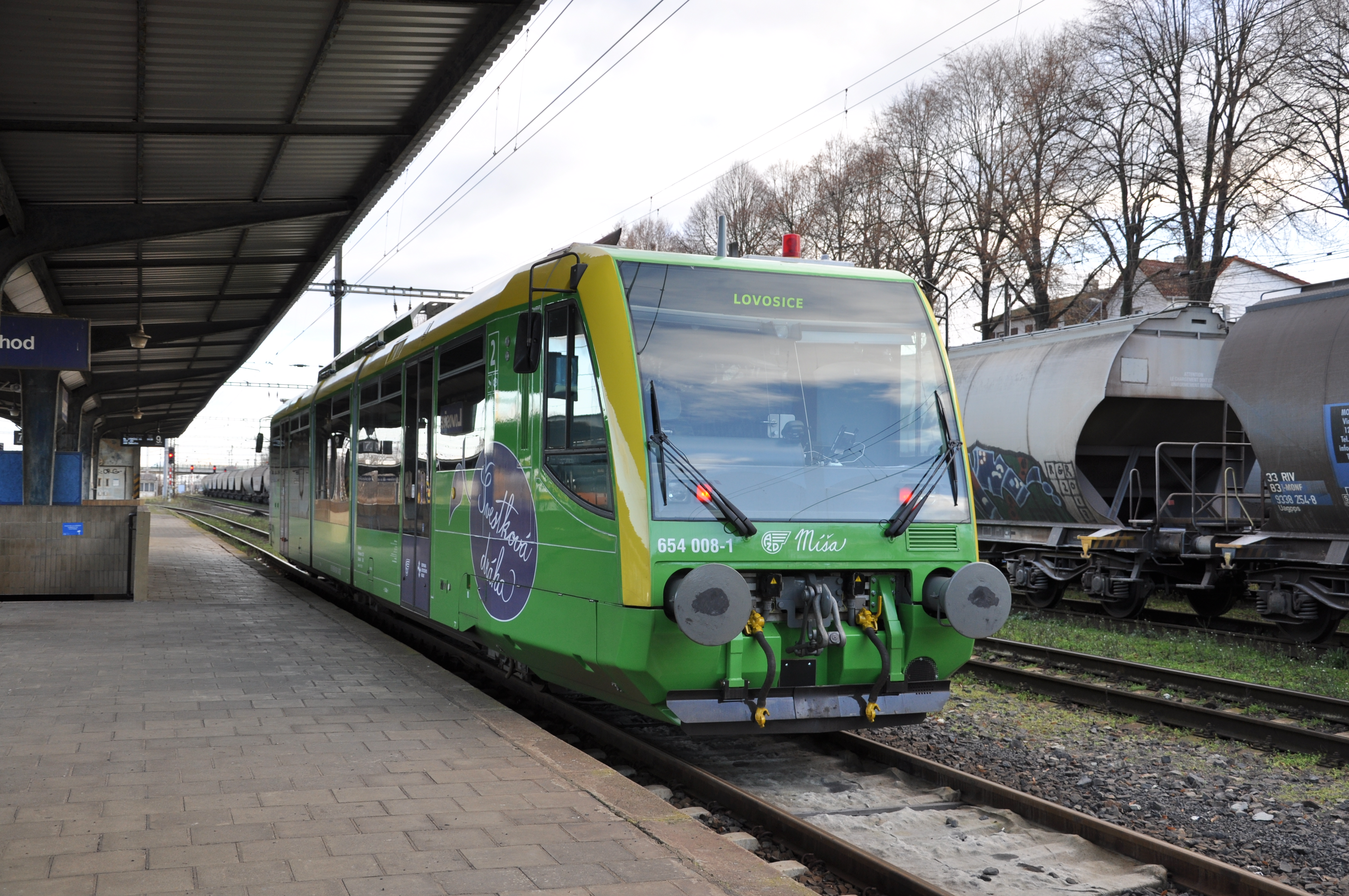 Regiosprinter des tschechischen Eisenbahnverkehrsunternehmens AŽD Praha im Bahnhof Lovosice, Tschechien. Die Fahrzeuge stammen von der Rurtalbahn in Deutschland und kommen seit 15. Dezember 2019 auf der Linie U10 Litoměřice – Lovosice – Most planmäßig zum Einsatz. Das hier abgebildete Fahrzeug 654 008-1 war überdies 2002 durch den Künstler Otmar Alt gestaltet worden und viele Jahre lang als Otmar-Alt-Sprinter für Sonderfahrten im Einatz.